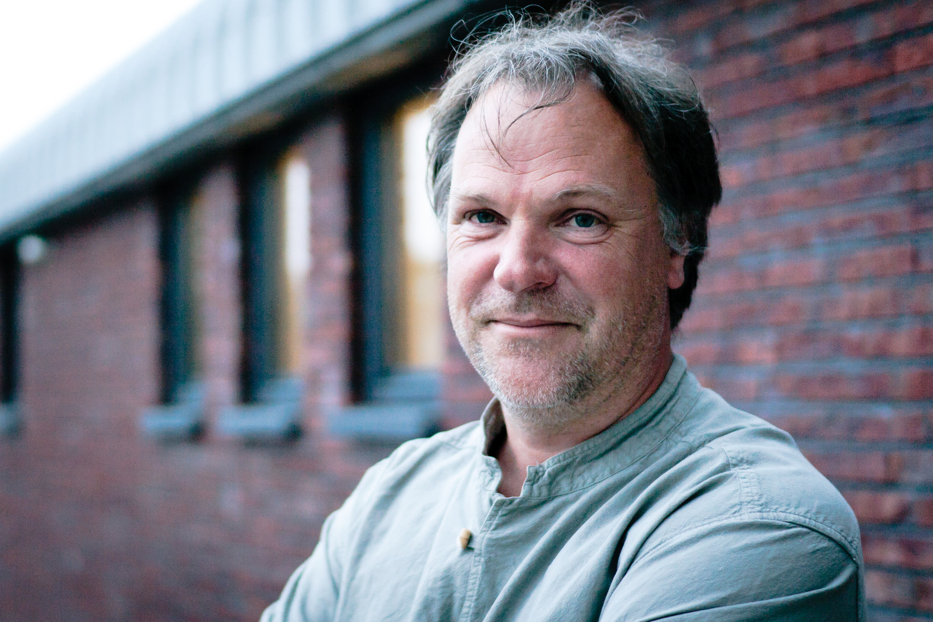 Hans Spekman in Friesland